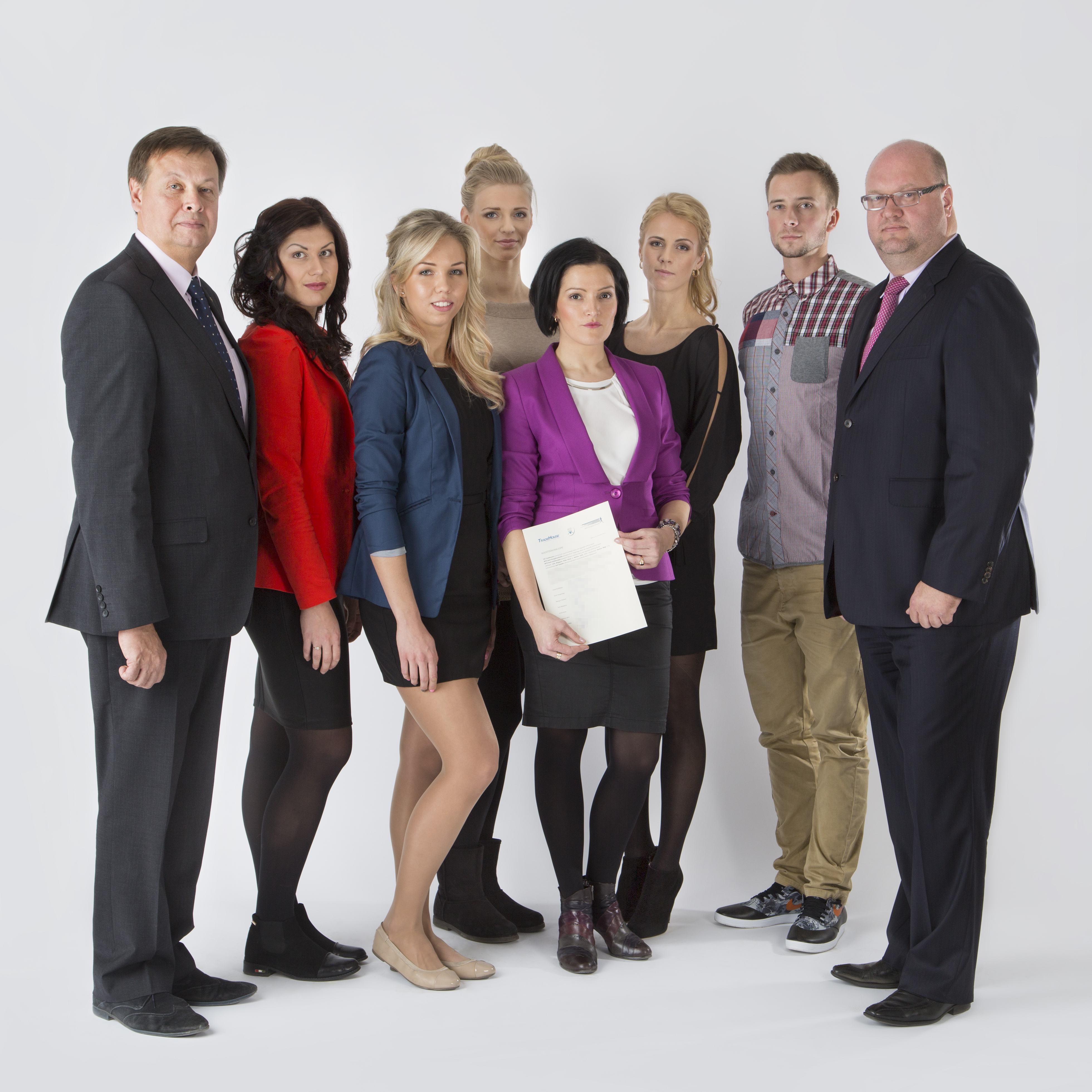 Stipendiumi saajad Rasmus Mägi, Erika Kirpu, Katrina Lehis, Julia Beljajeva, Grit Šadeiko ning Erich Teigamägi, Margus Hanson ja Laura Kuldkepp.